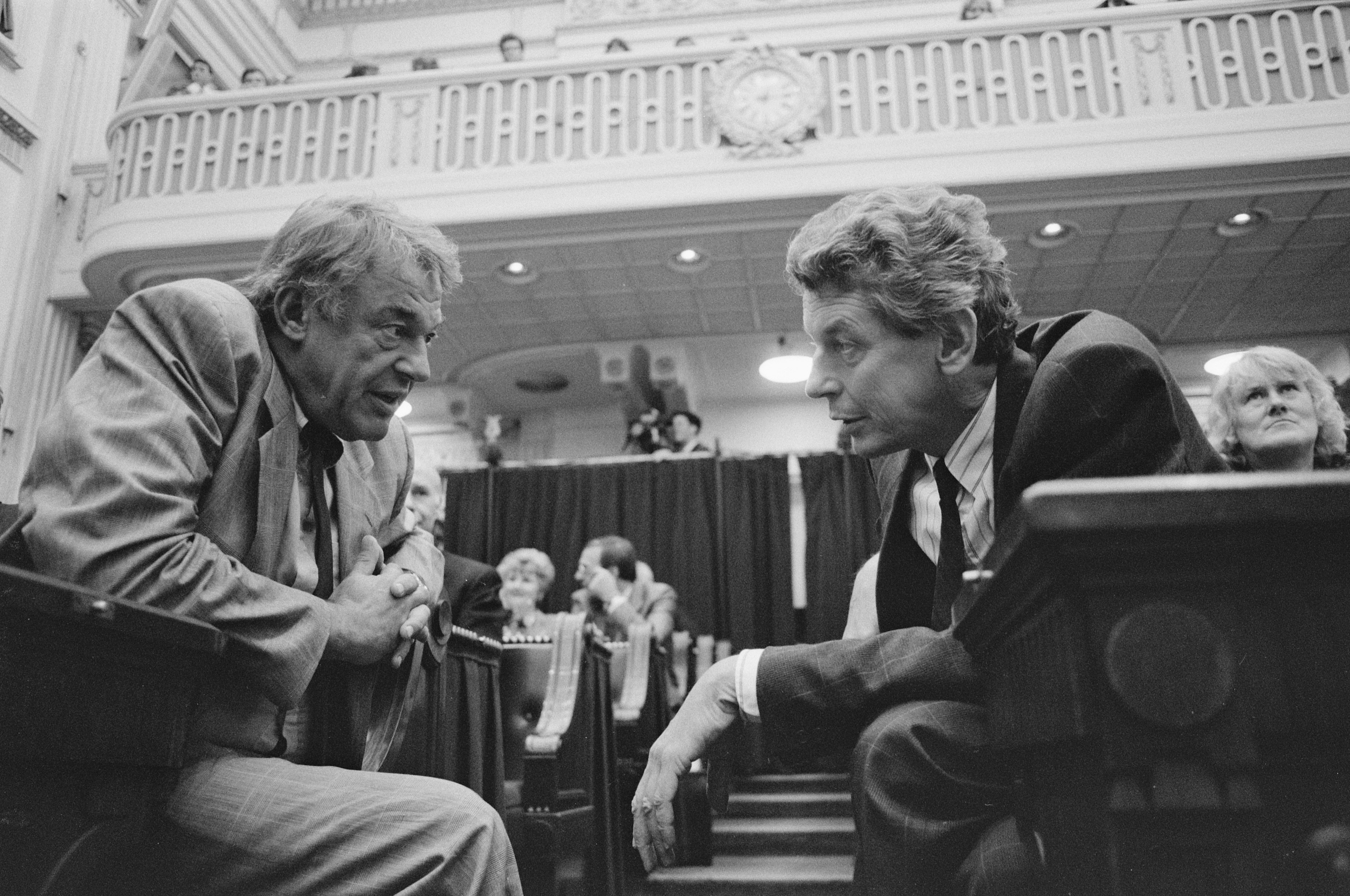 Collectie / Archief : Fotocollectie Anefo Reportage / Serie : Tweede Kamer; afscheid vertrekkende leden Beschrijving : Hans van Mierlo en Wim Kok Datum : 13 september 1989 Trefwoorden : afscheid, politiek Persoonsnaam : Kok, Wim, Mierlo, Hans van Fotograaf : Bogaerts, Rob / Anefo Auteursrechthebbende : Nationaal Archief Materiaalsoort : Negatief (zwart/wit) Nummer archiefinventaris : bekijk toegang 2.24.01.05 Bestanddeelnummer : 934-4996